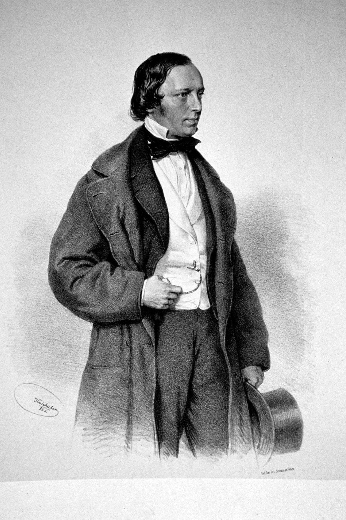 Eduard Lumpe (1813-1876), Dr. med., österreichischer Gynäkologe. Lithographie von Josef Kriehuber, 1862